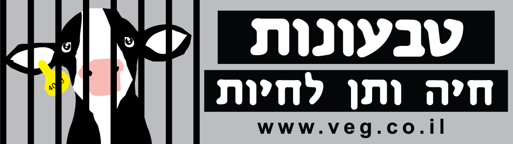 סטיקר טבעונות -חיה ותן לחיות